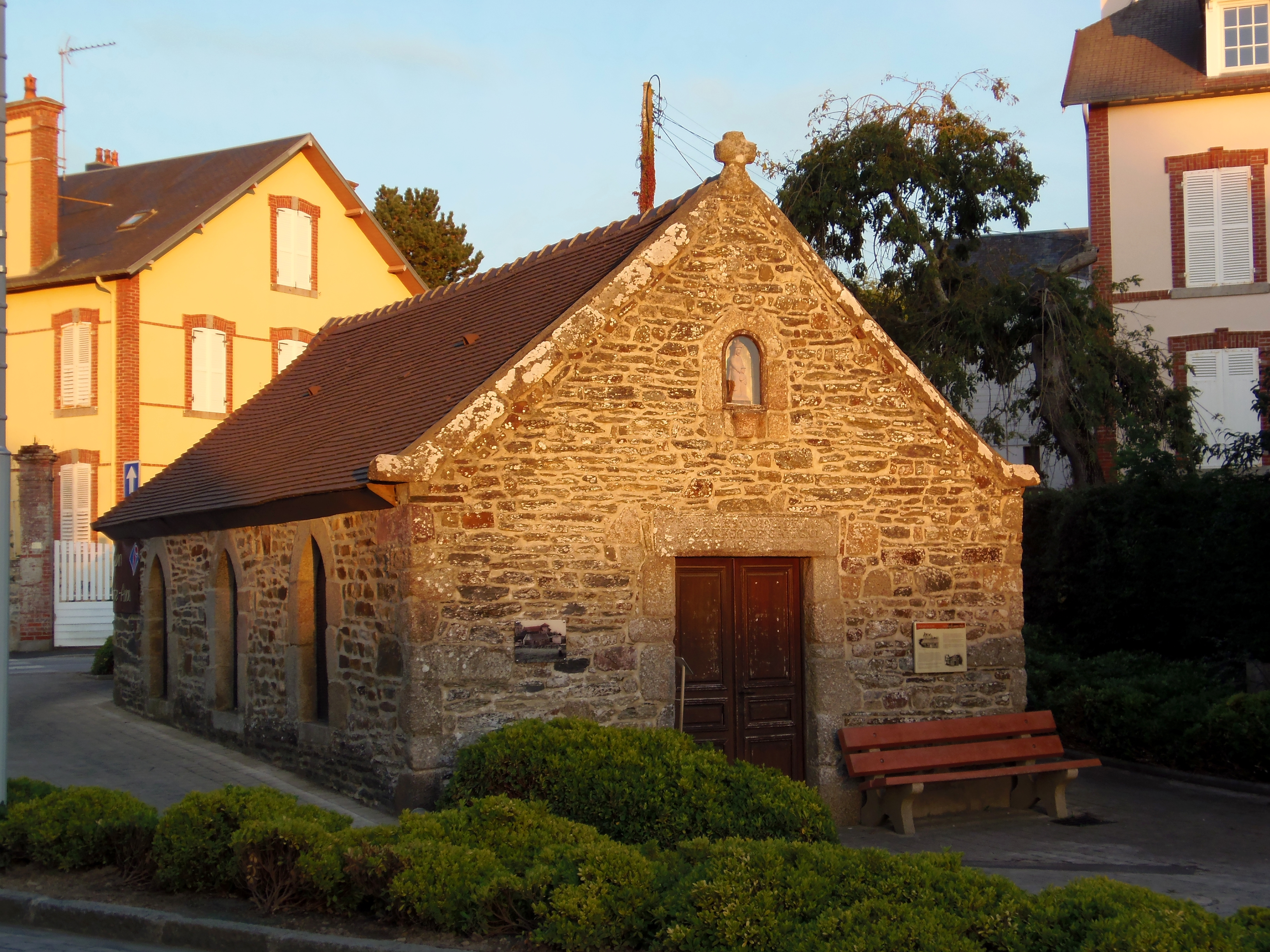 Saint-Pair-sur-Mer (Normandie, France). La chapelle Sainte-Anne.